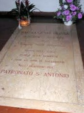 Milano - Chiesa del Sacro Volto - Via Sebenico, 31 - Lastra sepolcrale di Don Eugenio Bussa